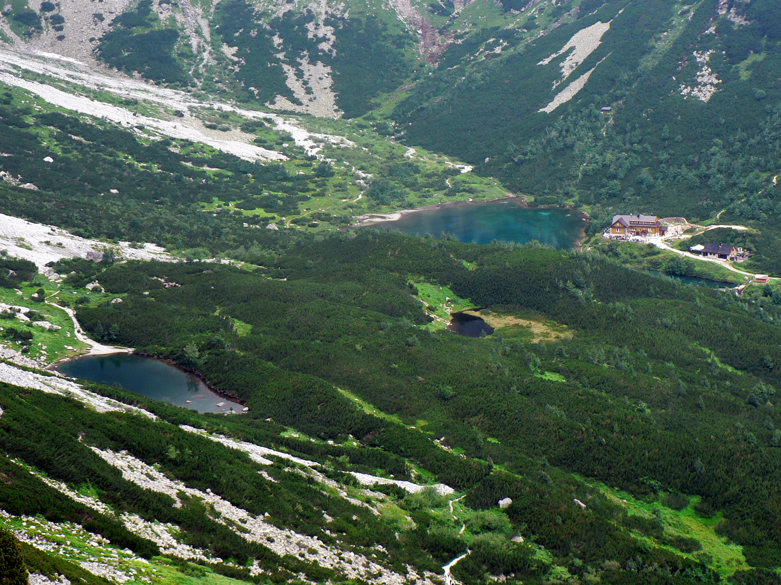 Czarny, Mały i Zielony Staw Kieżmarski ze szlaku na Rakuski Przechód